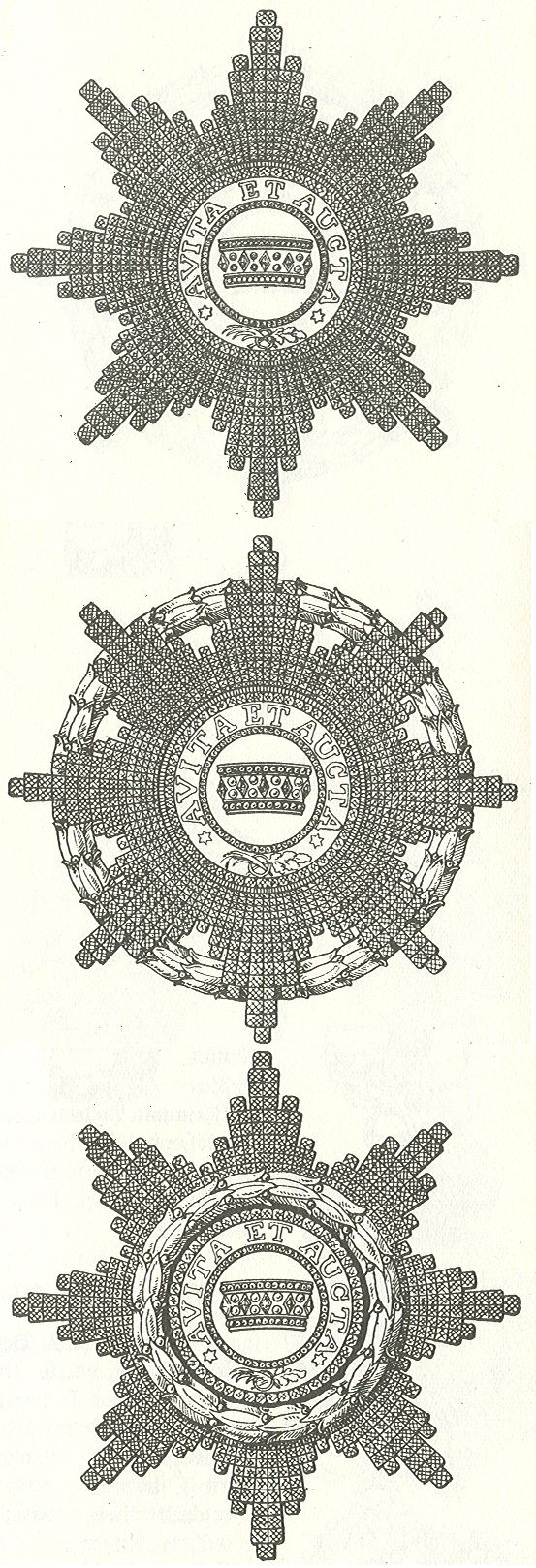 Scan van Blz. 278, 279 en 280 van het boek "Handbuch der Ritter- und Verdienstorden " uitgegeven 1893 door Weber.Tekening van de in 1902 overleden Maximilian Gritzner. Robert Prummel 10 jul 2008 16:40 (CEST)